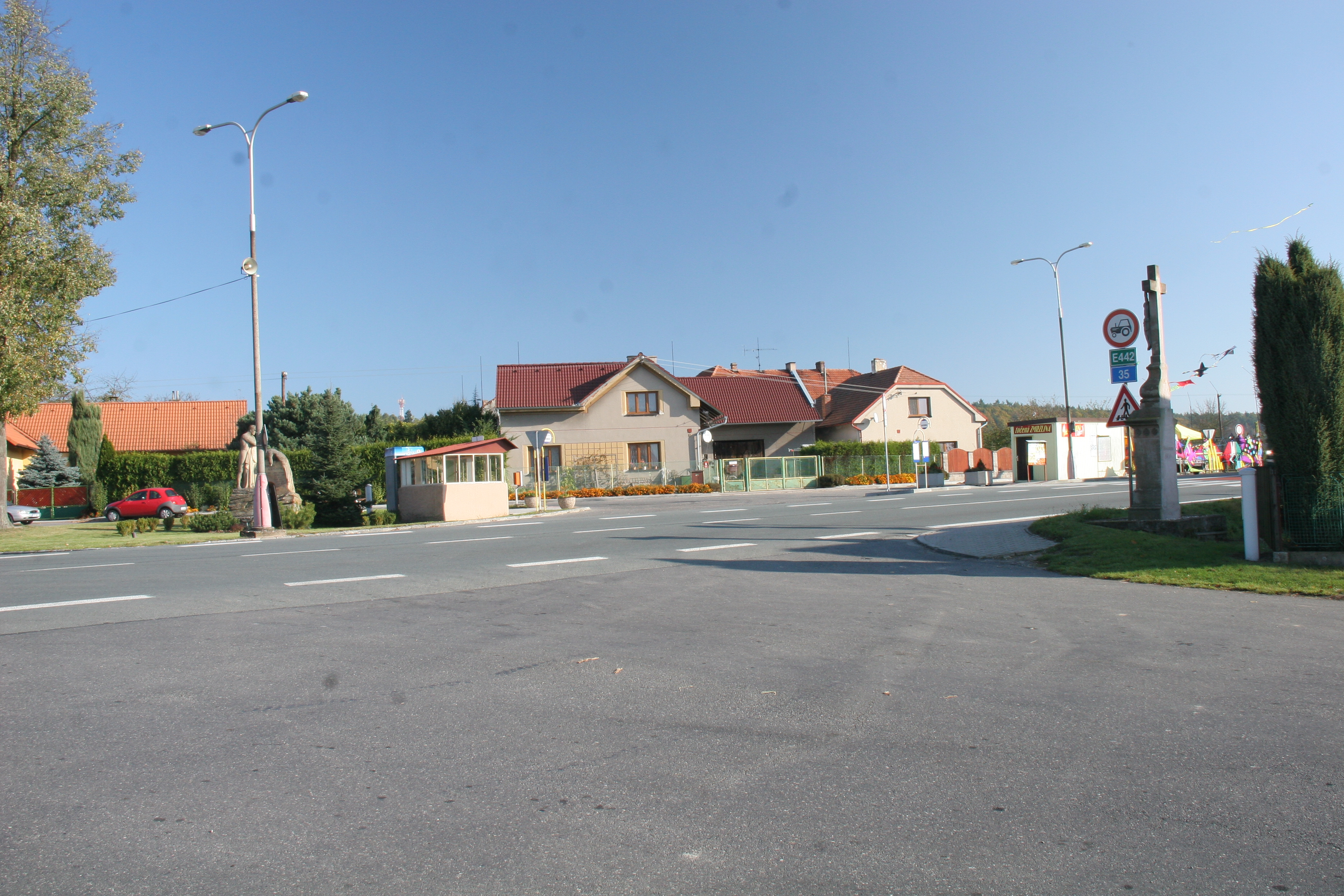 Jaroslav křižovatka